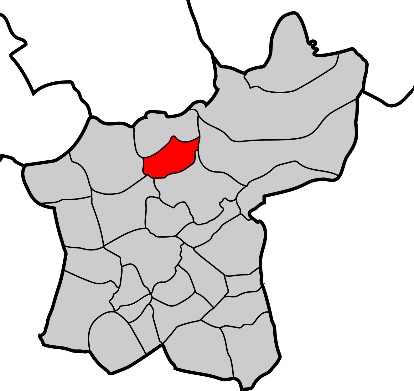 Mapa parroquia de Vilachambre Baralla